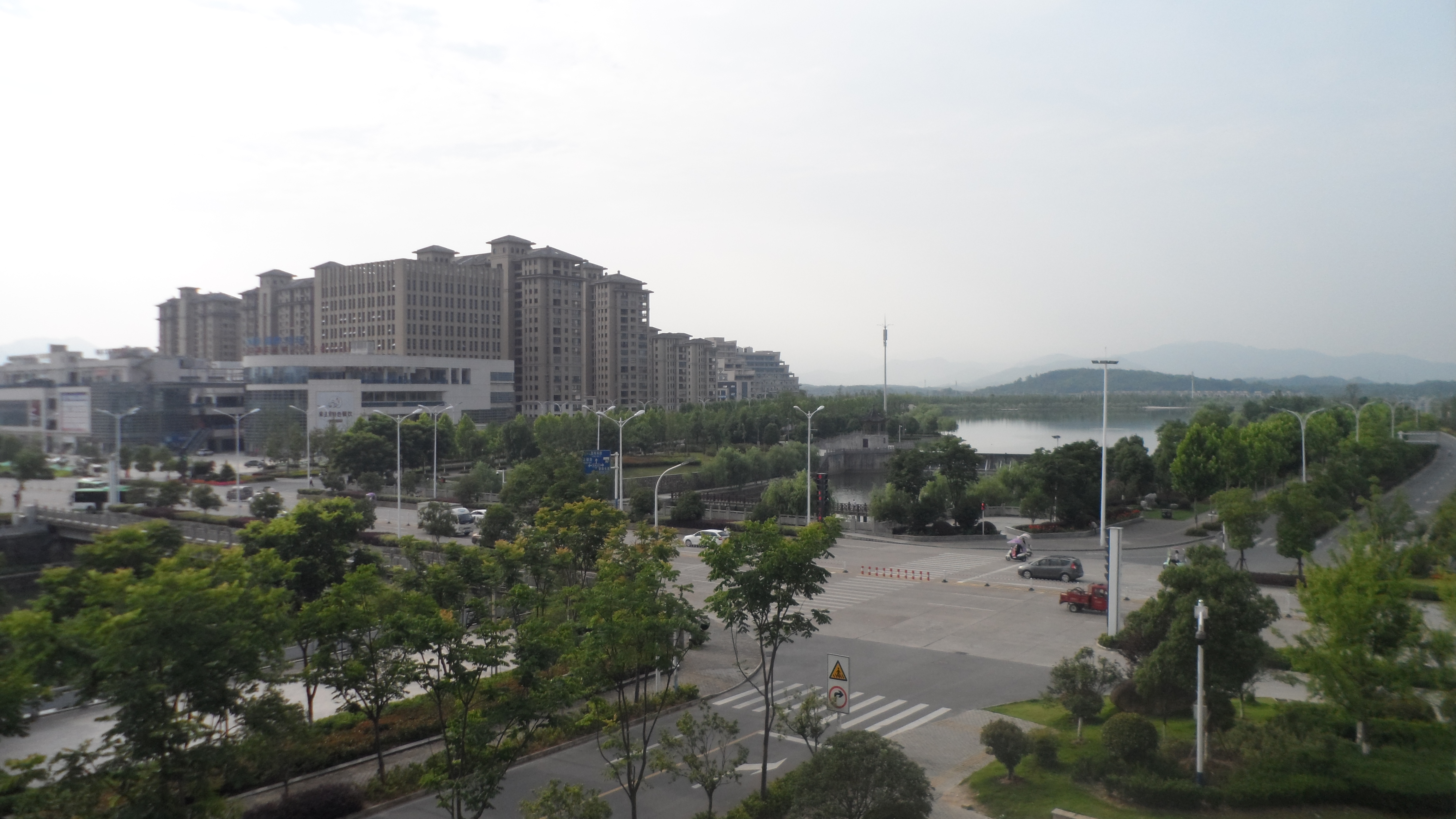 安徽池州青阳县